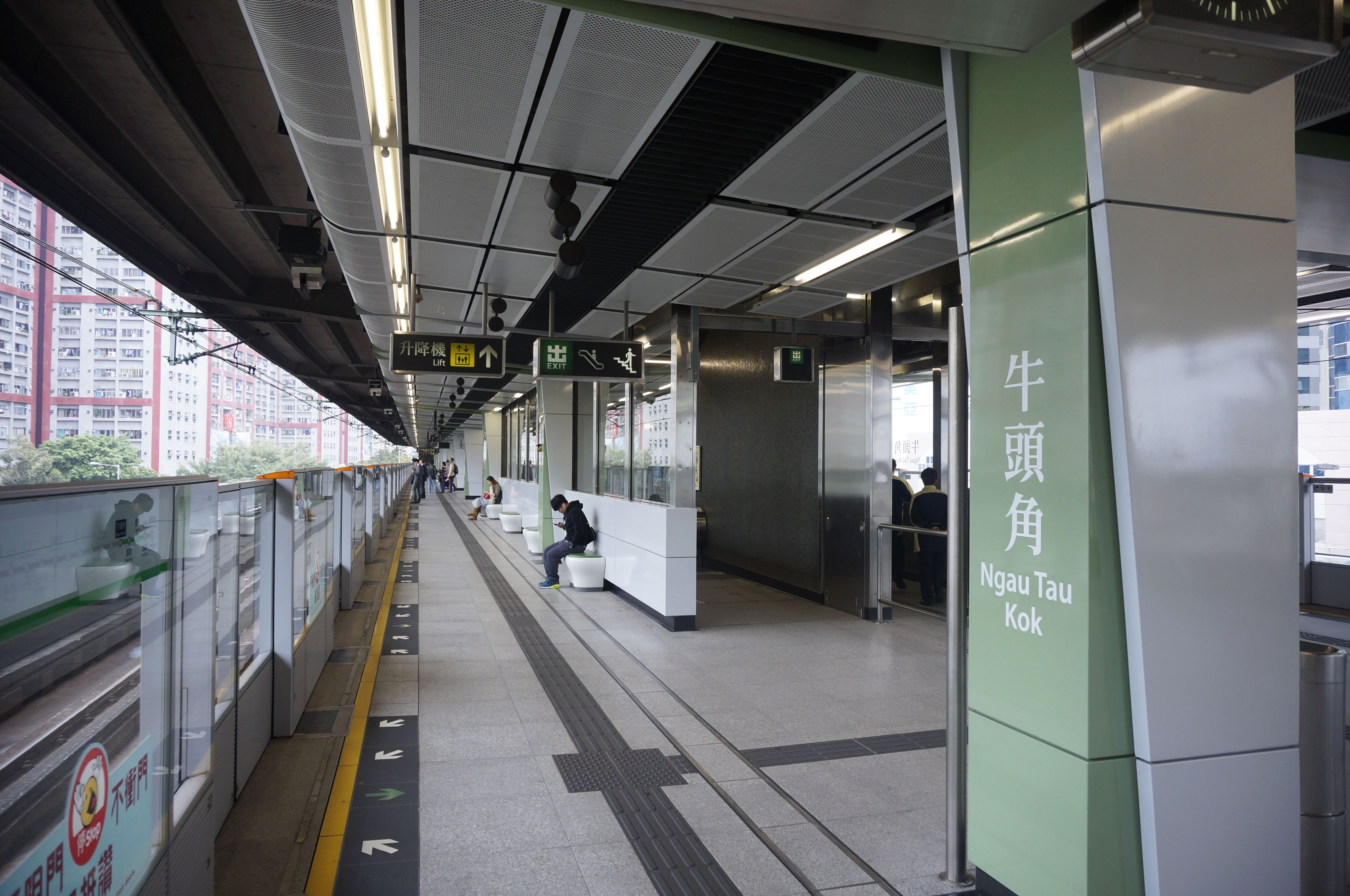 港鐵牛頭角站月台